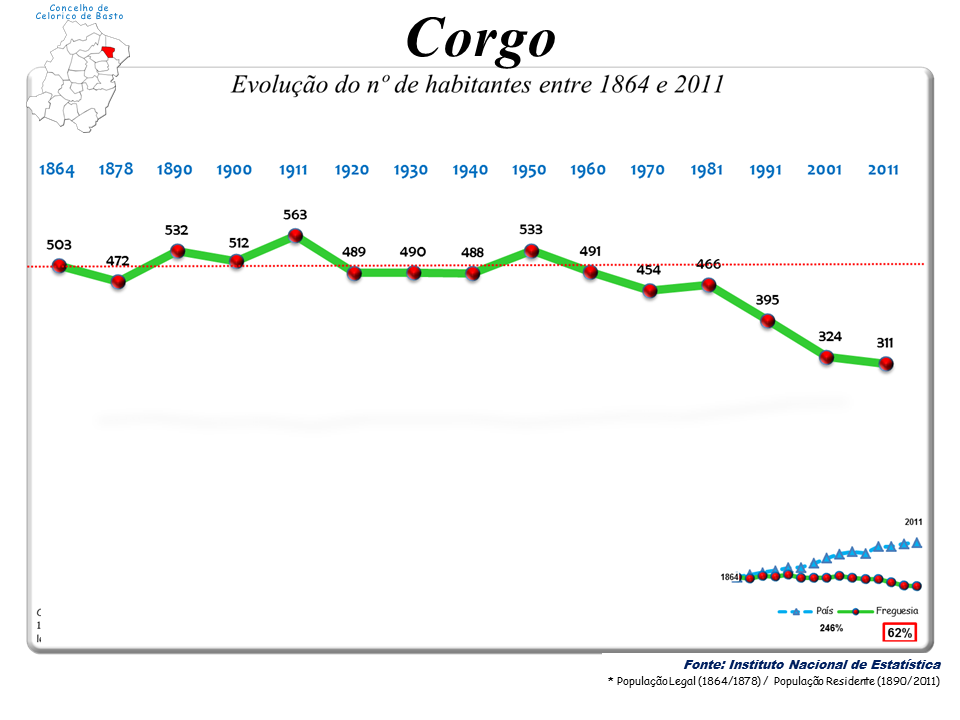 Censos 1864/2011